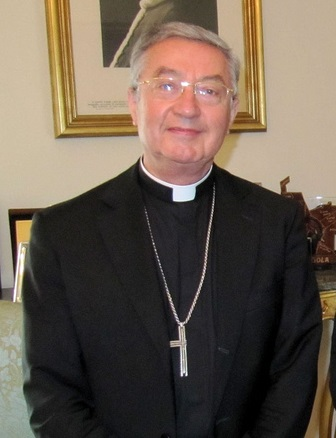 Mgr Jean-Louis Bruguès lors de la première rencontre officielle du recteur espagnole Ignacio Sanchez avec le Pape Benoit XVI.